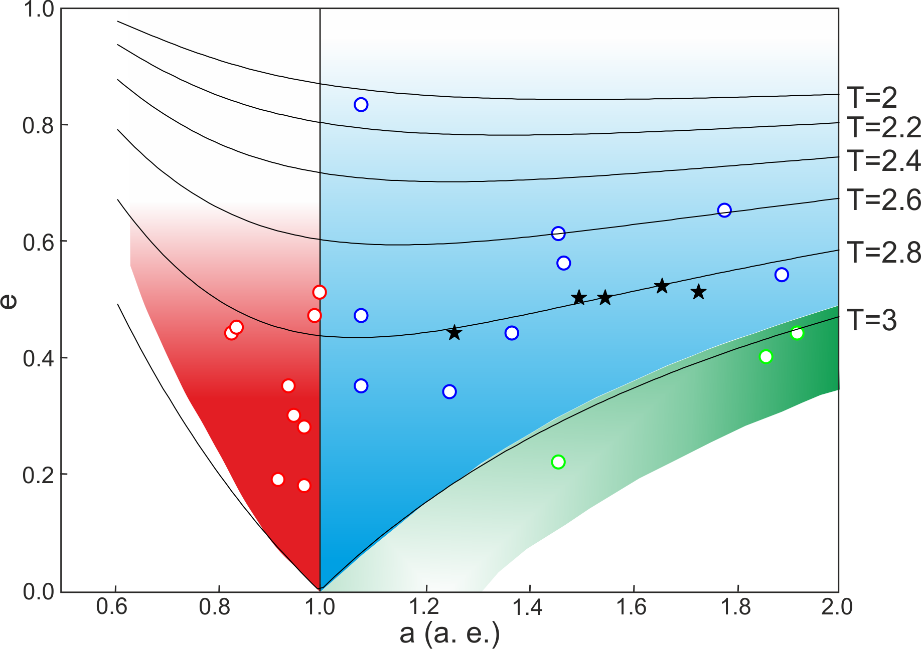 Оценки (на 1 апреля) AMS Zuluaga2013 IAU 3423 Zuluaga2013b ИНАСАН Аполлоны (астероиды) (1566) Икар (1620) Географ (1685) Торо (1862) Аполлон (1863) Антиной (1864) Дедал (1865) Цербер (1866) Сизиф (1981) Мидас (2063) Бахус Атоны (2062) Атон (2100) Ра-Шалом (2340) Хатхор (3362) Хуфу (3554) Амон (3753) Круитни (5381) Сехмет (99942) Апофис (136818) Селкет Амуры (433) Эрос (1221) Амур (1627) Ивар e = 1 − 1 4 a ( T − 1 a ) 2 {\displaystyle e={\sqrt {1-{\frac {1}{4a \left(T-{\frac {1}{a \right)^{2